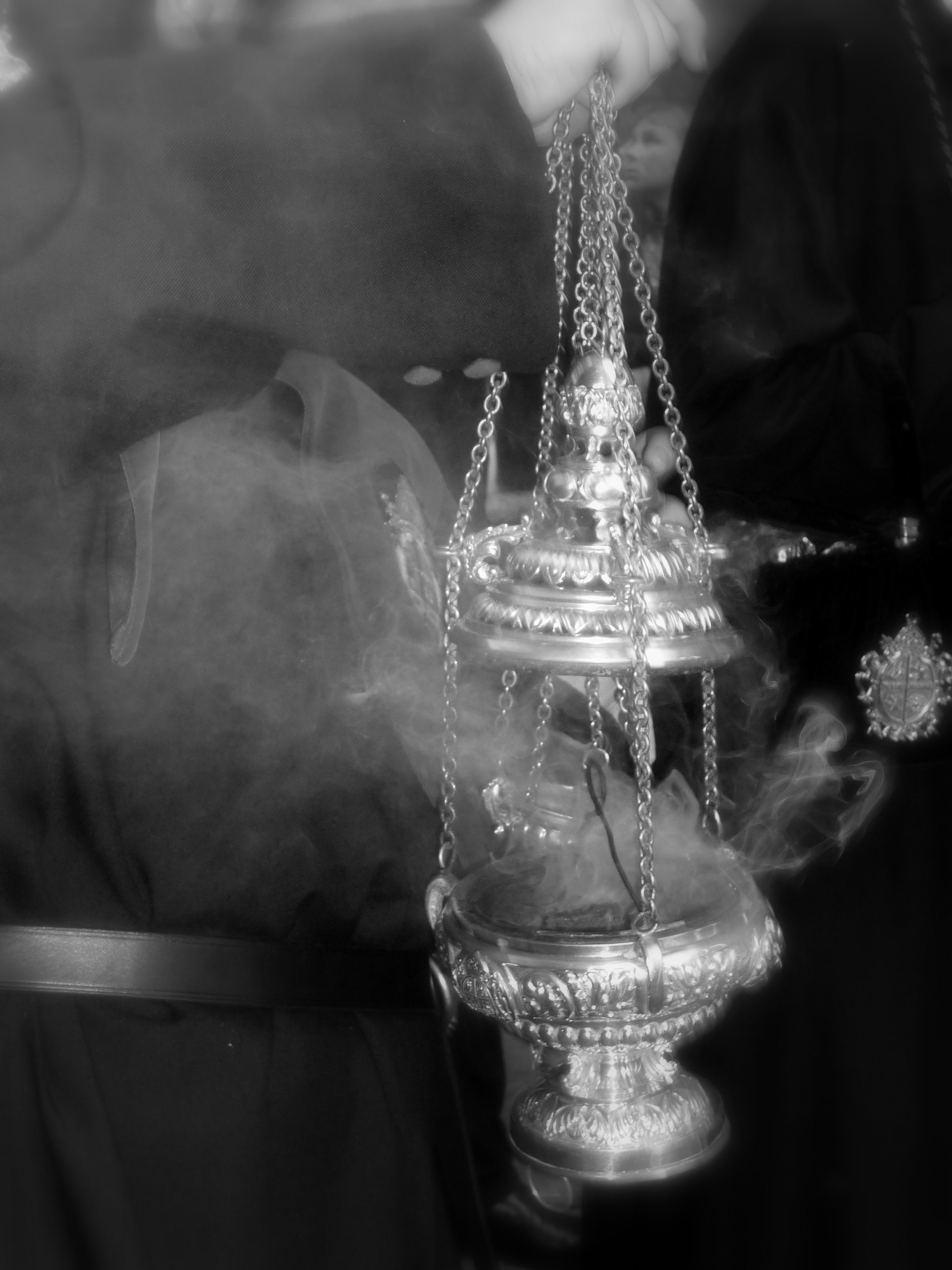 Detalle incienciario en Semana Santa (Huelva, España)